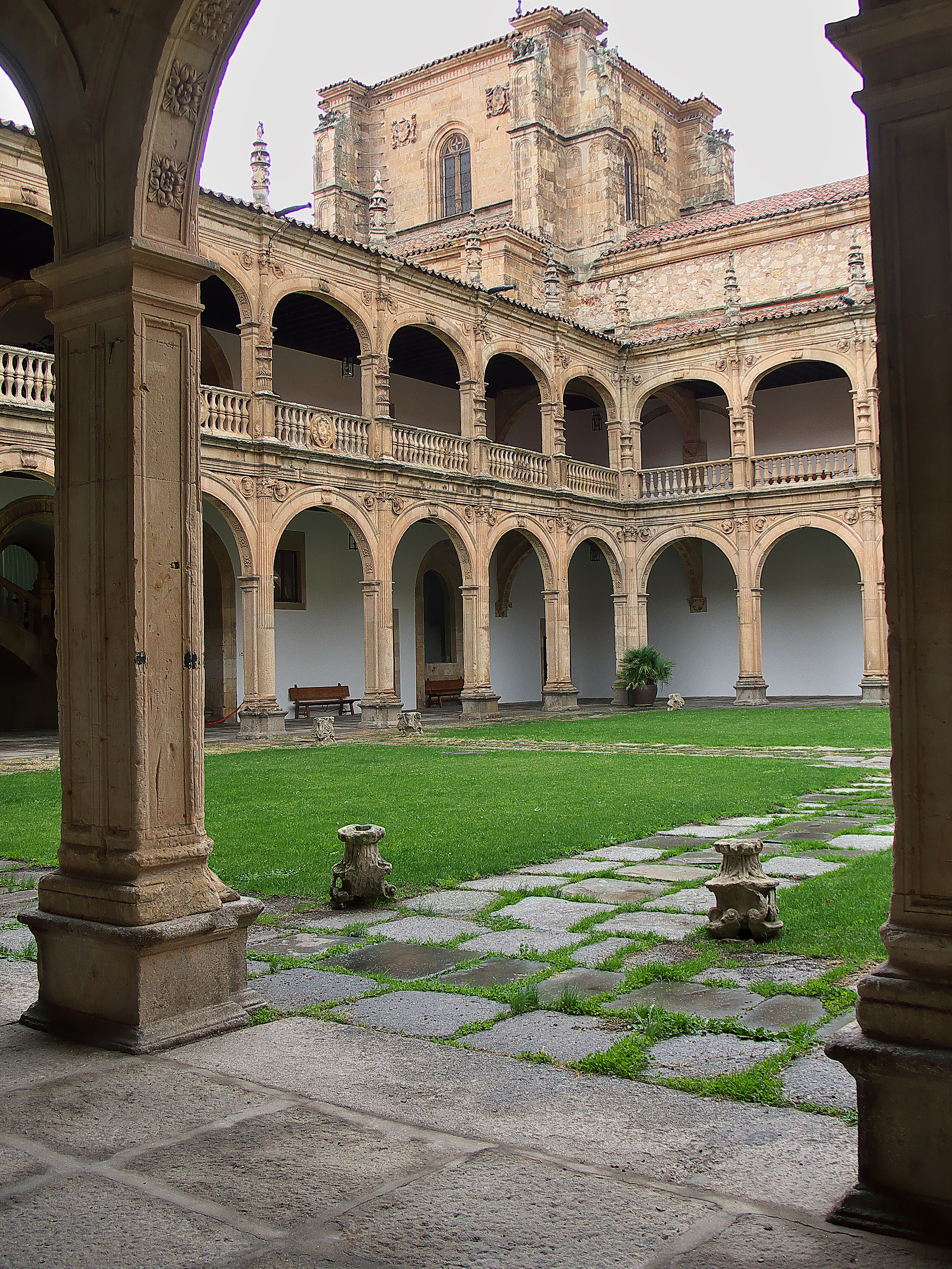 Aunque existen unas trazas de Diego de Siloé para Alonso de Fonseca y Ulloa (ca. 1519), los recursos arquitectónicos y artísticos en este patio, apuntan a la maestría de Juan de Álava.